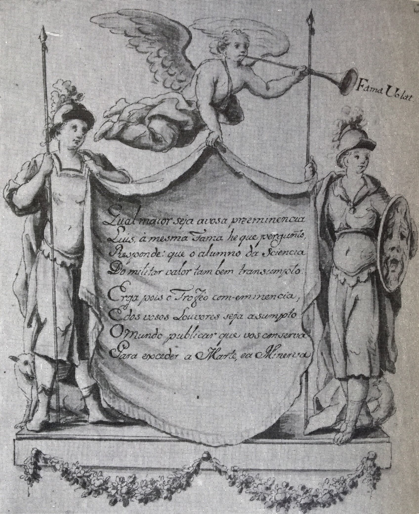 Portada rococó do manuscrito original de Antônio Francisco Soares, apresentando um texto laudatório ao vice-rei.